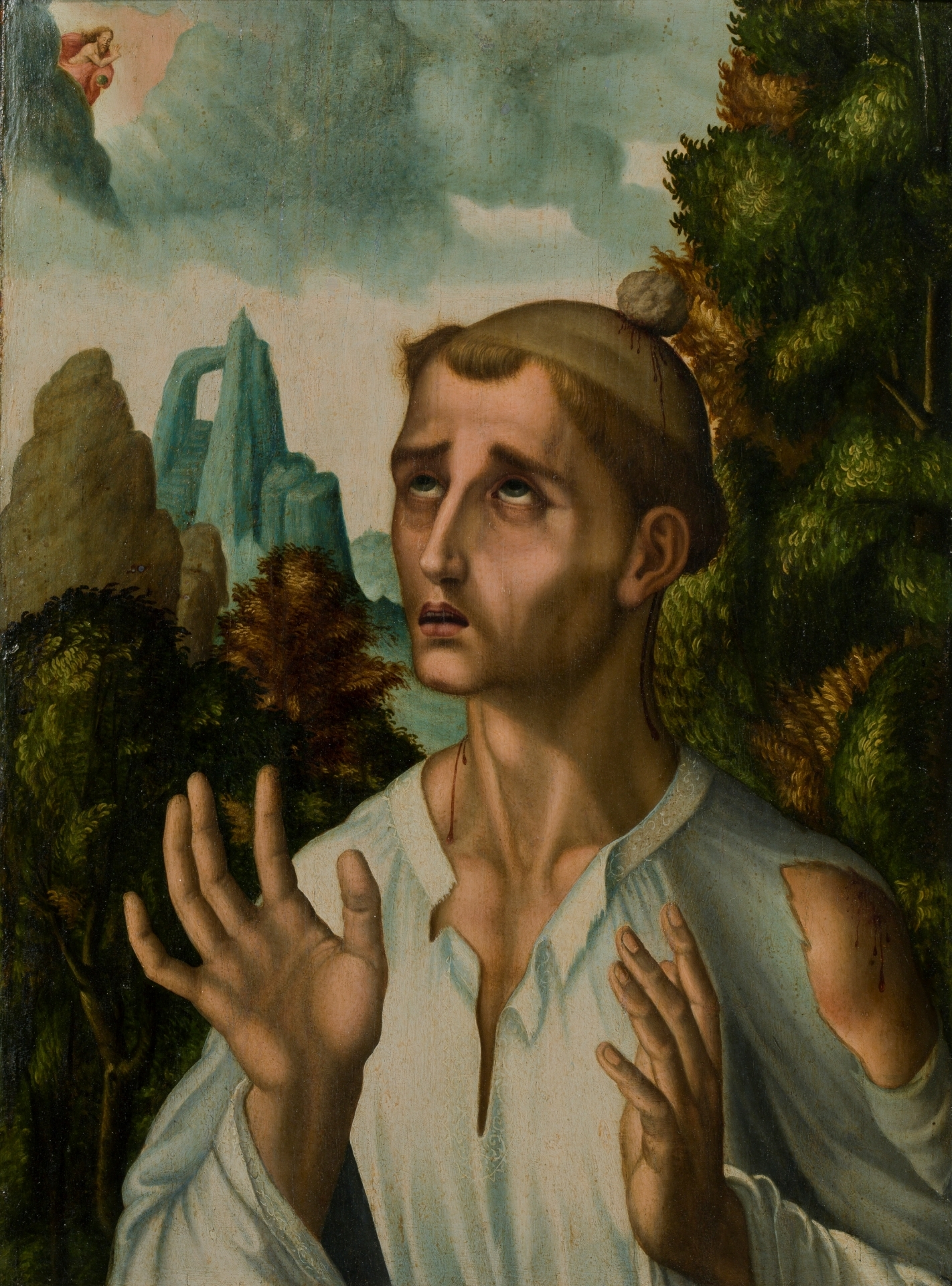 La obra representa al diácono y protomártir San Esteban, que fue apedreado hasta la muerte a las afueras de Jerusalén por profesar el cristianismo.